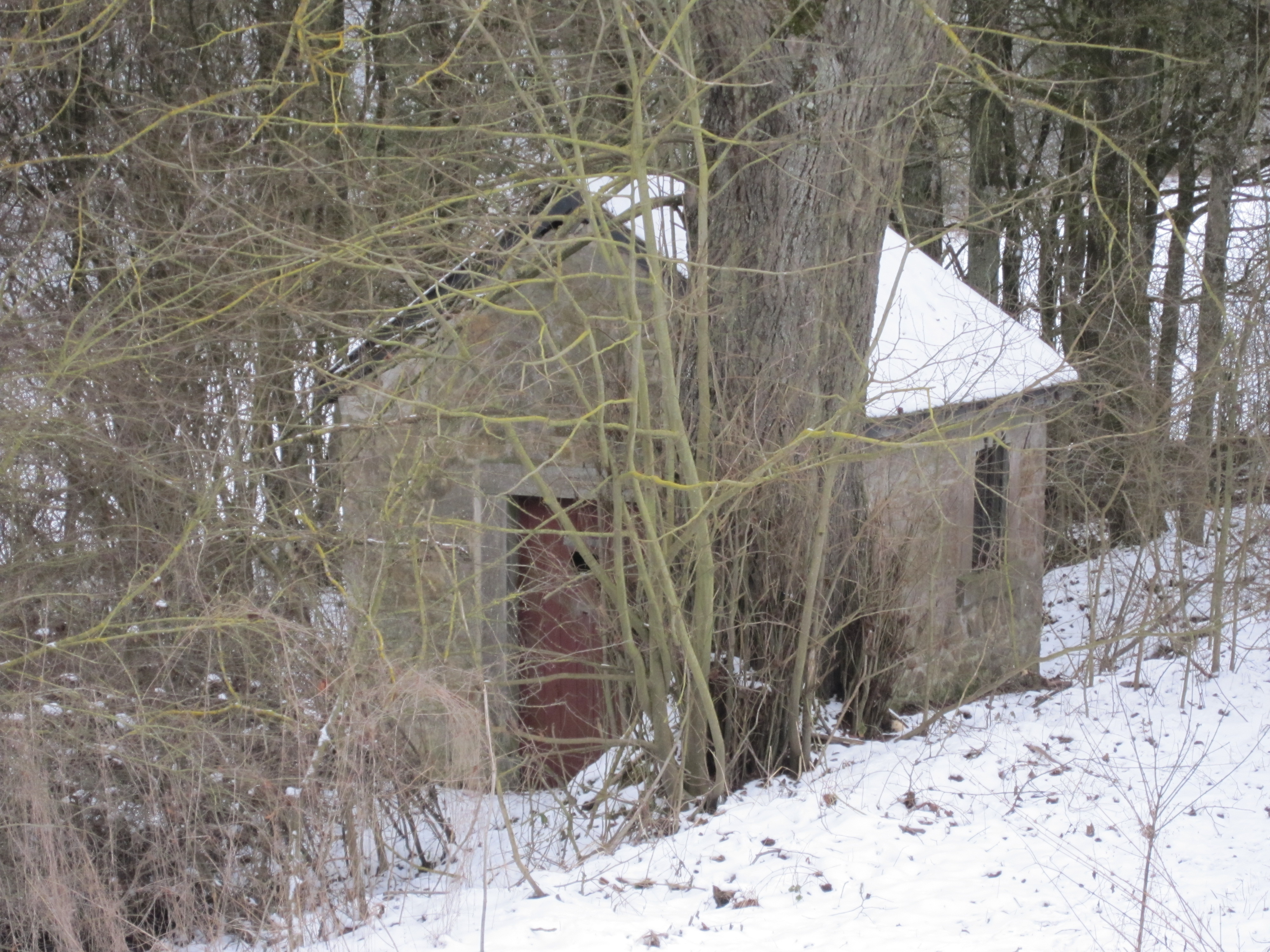 Chapelle dédiée à Saint-Thibaut. Cette petite construction très sobre, datée du XIXe siècle, fut érigée, sous un tilleul, en moellons calcaires équarris et terminée par une abside à trois pans.